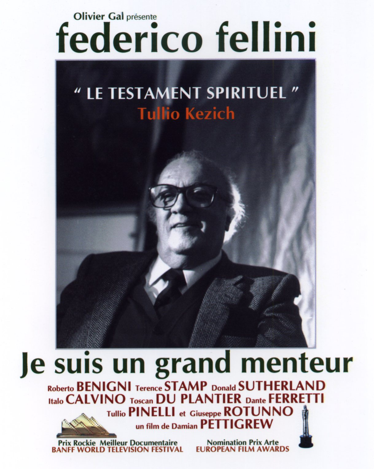 Poster for Fellini, je suis un grand menteur